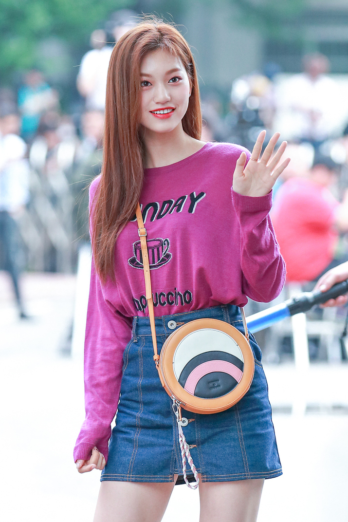 조선말: 170825 위키미키 도연 뮤직뱅크 출근길